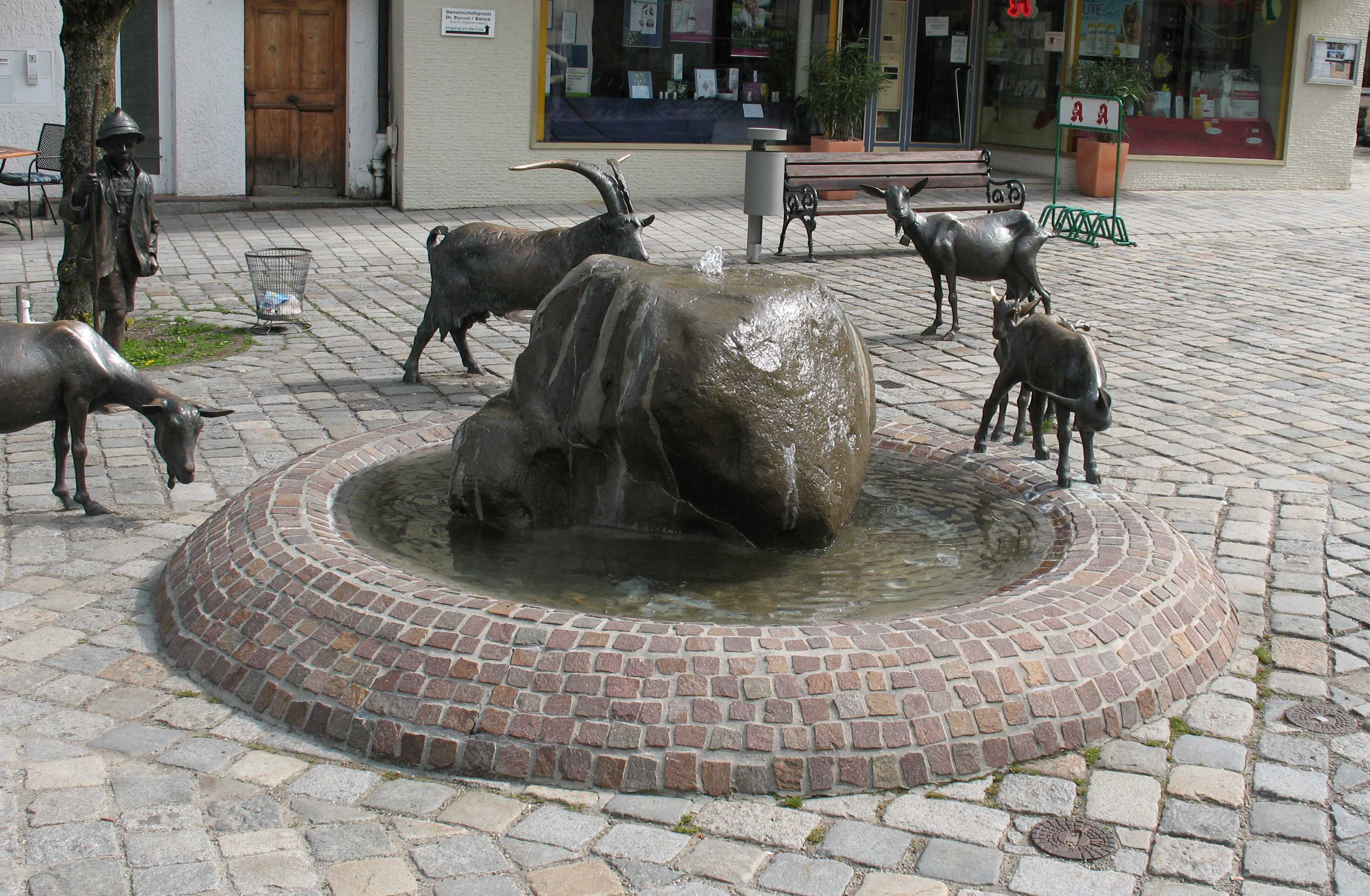 Geißenbrunnen am Klosterplatz